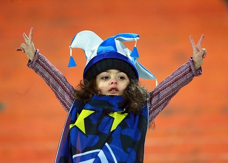 دیدار تیم های فوتبال استقلال تهران و ذوب آهن اصفهان